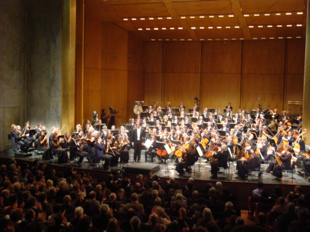 L'Orchestre National de France dirigé par Daniele Gatti.